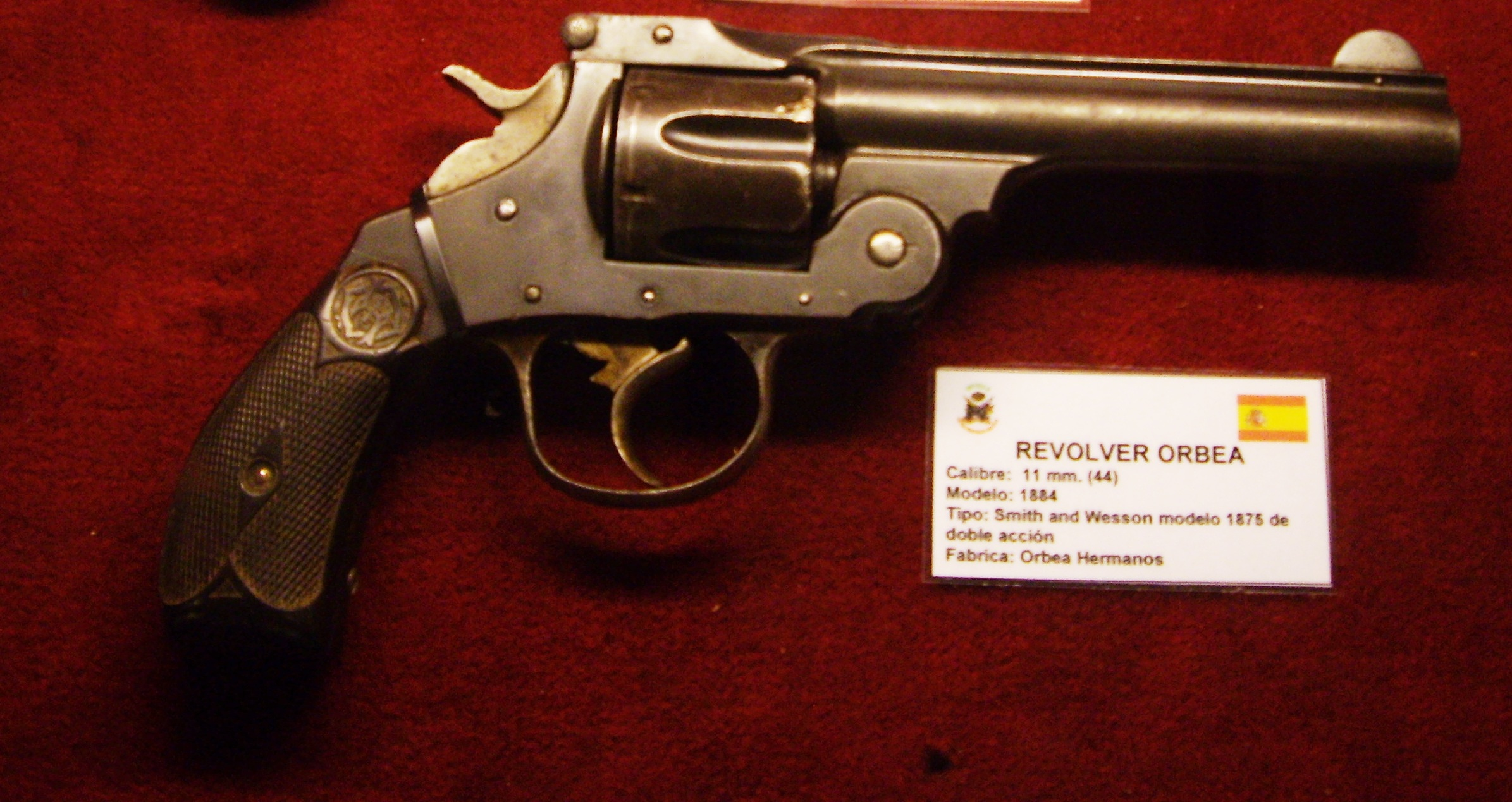 Revólver de Orbea Hermanos en el Museo Histórico Militar de Sevilla, en España, calibre 11 mm (44), modelo 1884, tipo Smith and Wesson modelo 1875